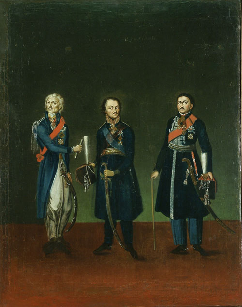 Тройной портрет: М.И. Платов, Ф.П. Денисов, В.П. Орлов